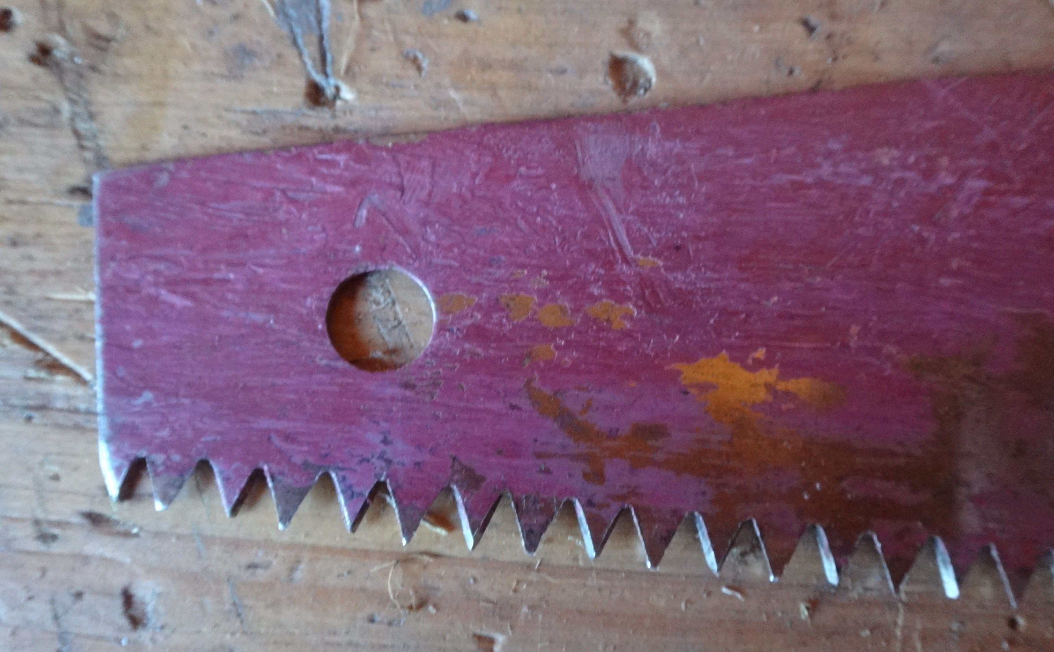 Зубья пилы-мелкозубки